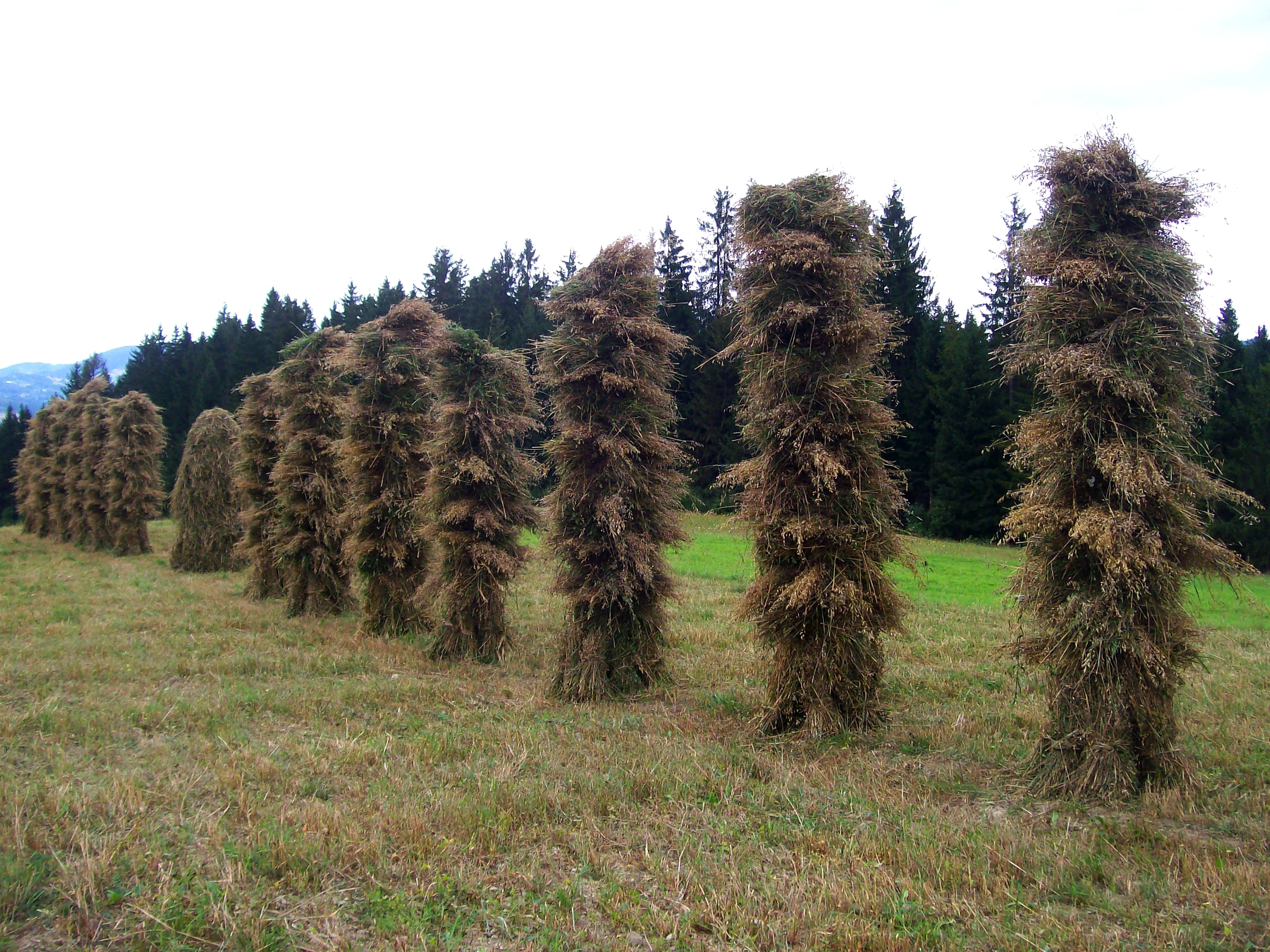 Soblówka, żniwa owsiane.